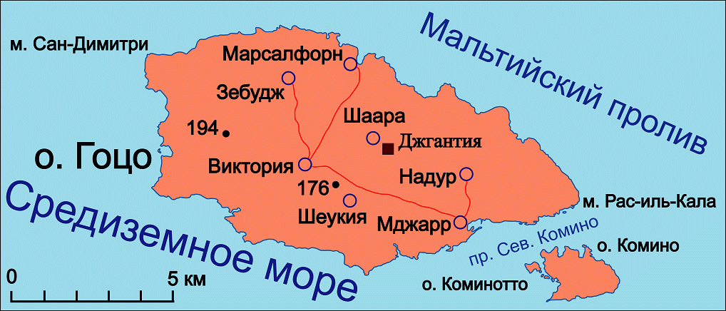 Беларуская (тарашкевіца): Мапа Гоца